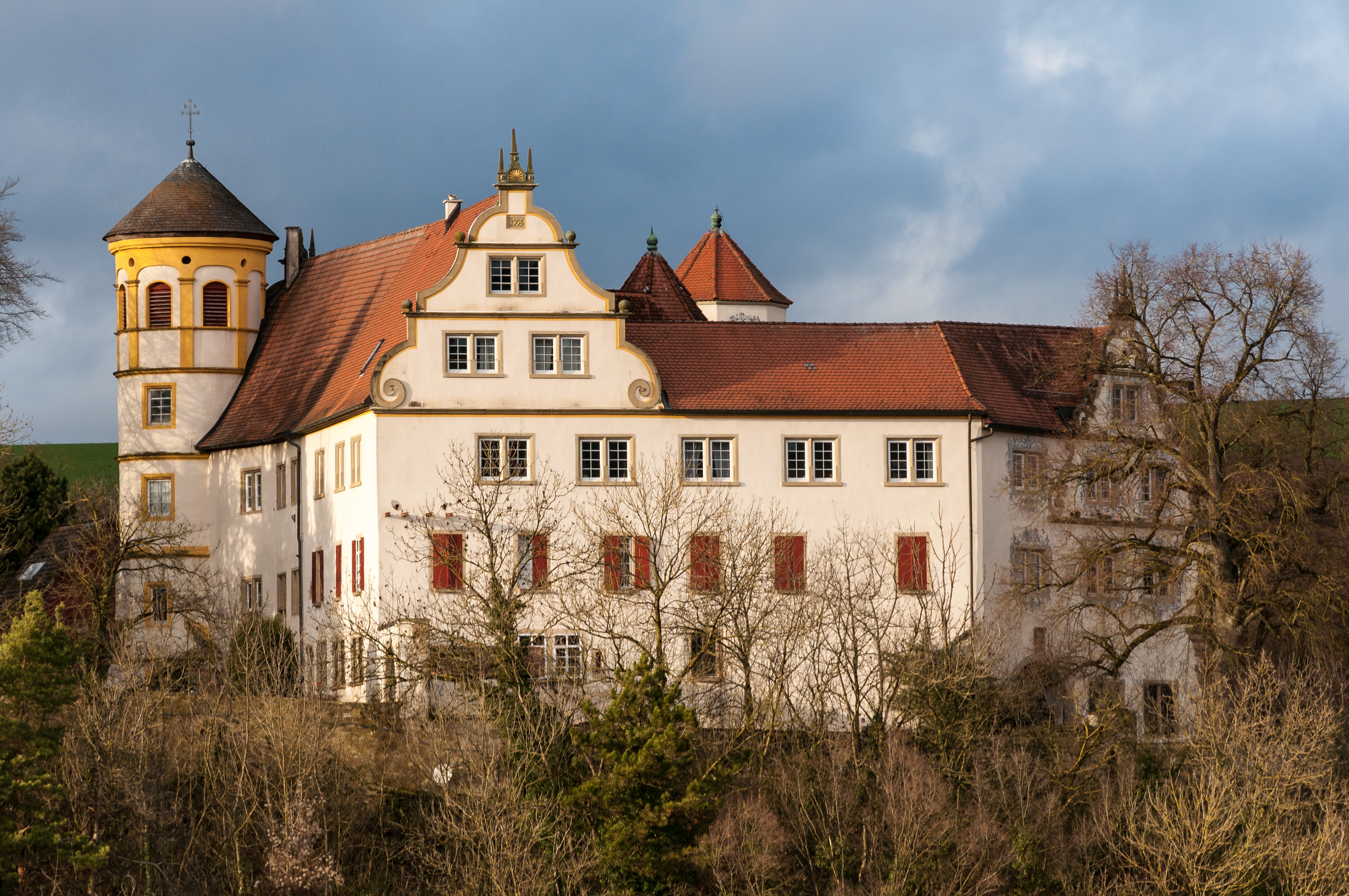 Burg Laibach von der gegenüberliegenden Seite des Laibachtals gesehen